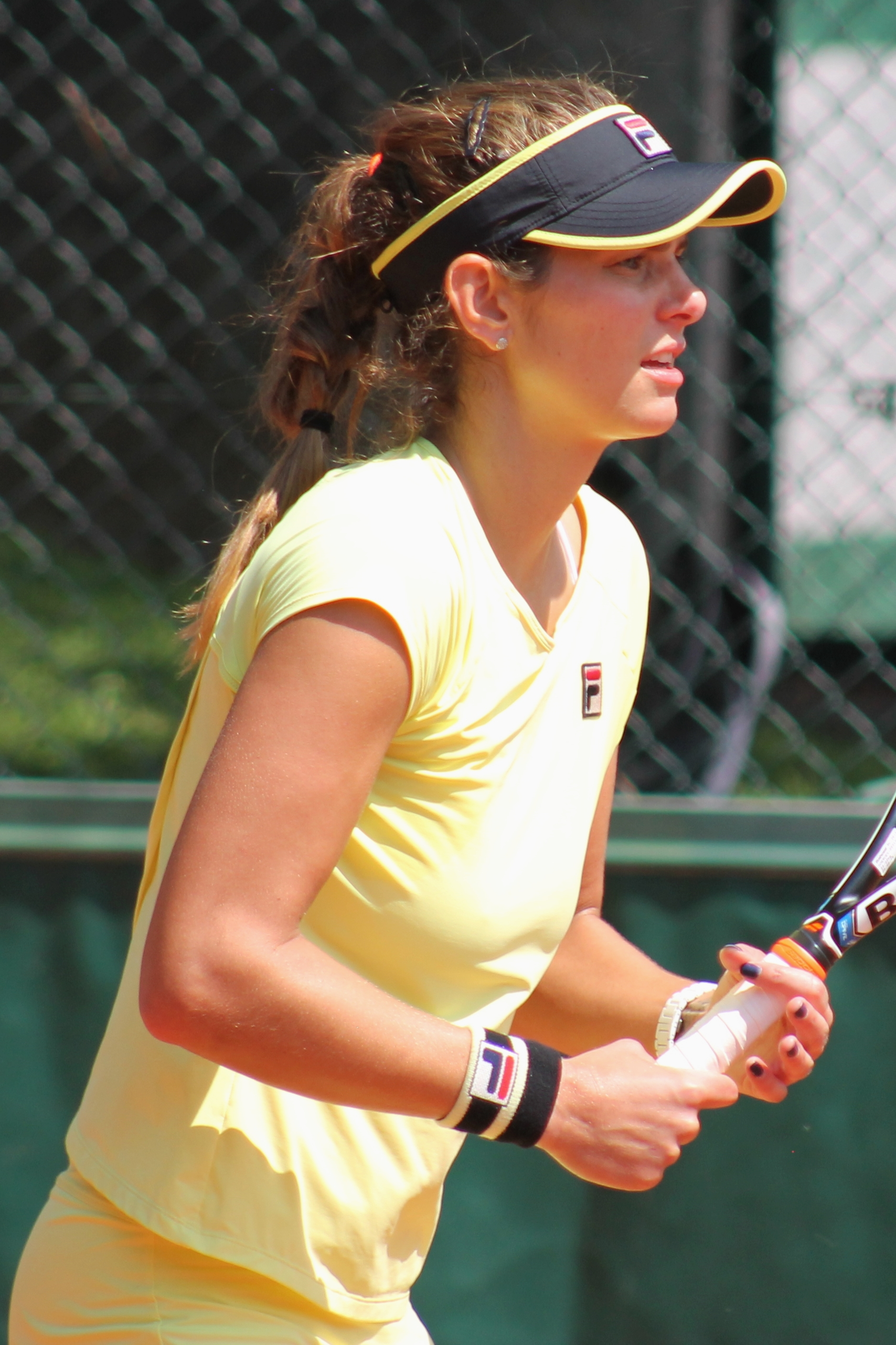 Goerges RG15 (4)